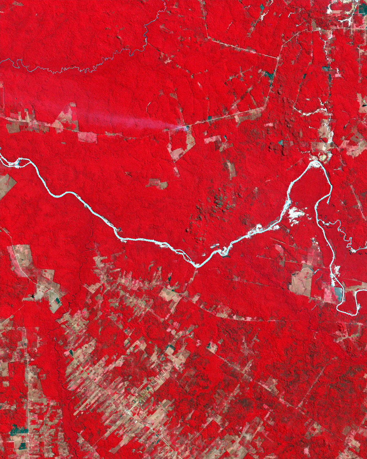 Deforestation in Mato Grosso, Brazil -- 1992